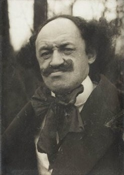 malíř Robert Guttmann